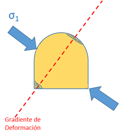 lajamiento